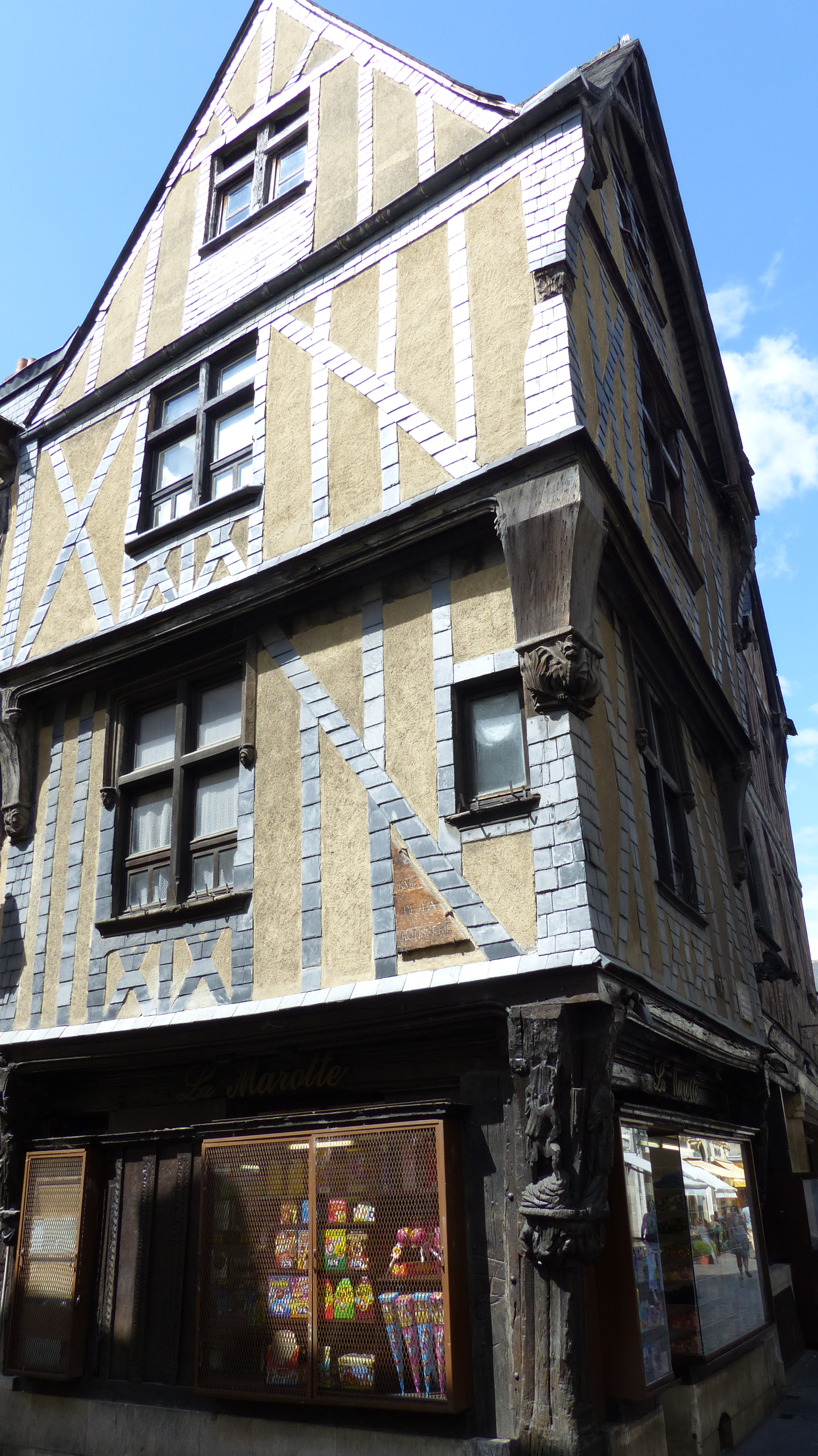 Immeuble .